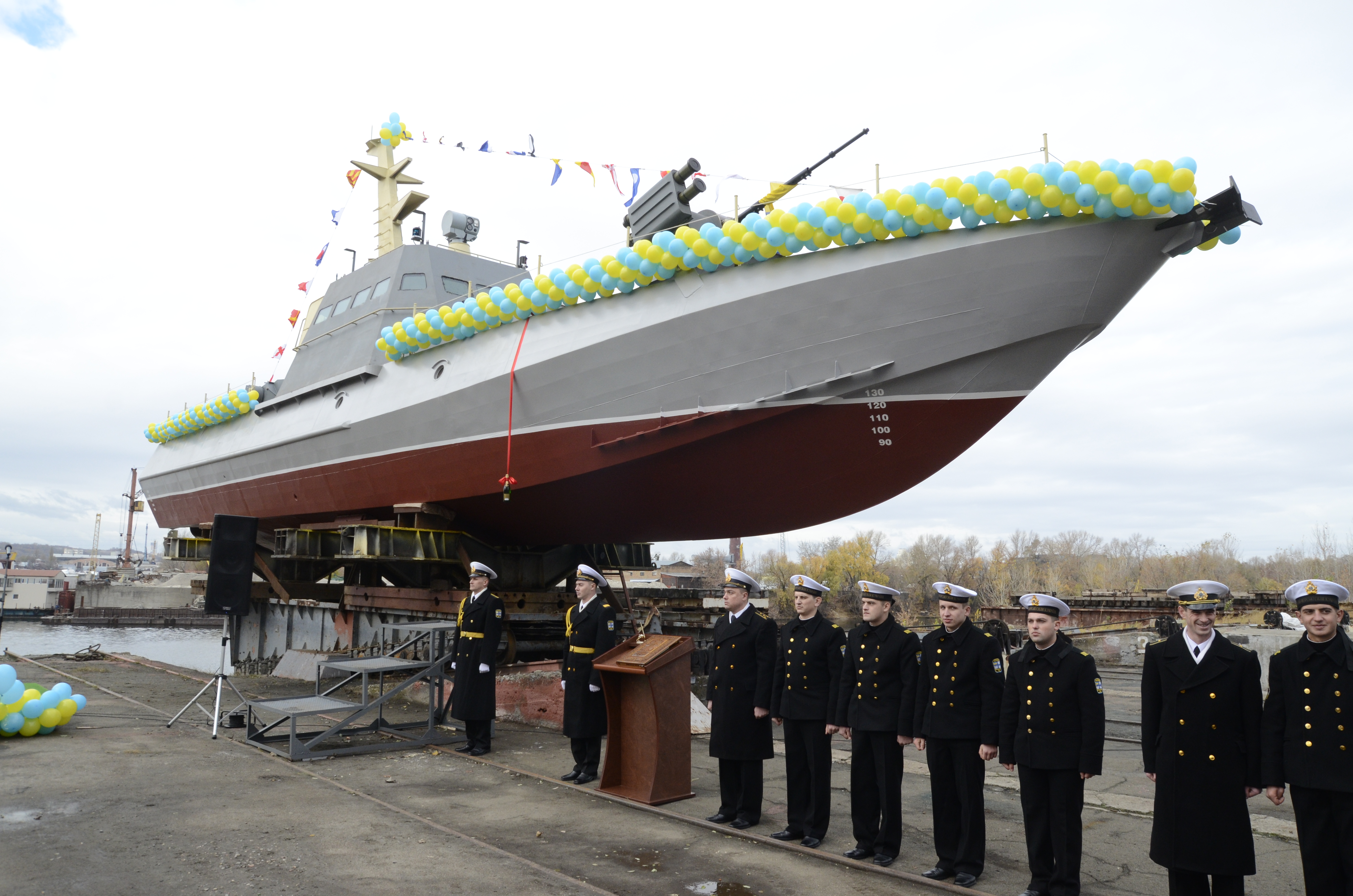 Бронекатер для ВМС "Гюрза-М" перед спуском на воду Фото Андрій Шматов Артиллерийское судно предназначено для охраны и обороны портов морских и речных коммуникаций в пределах территориального моря, изоляции участков морского или речного побережья, а также обороны на пограничных реках. Длина катера составляет 23,7 метра, высота - 4,8 метра. Корабль способен развивать скорость до 25 узлов с экипажем до пяти человек на борту. Дальность хода - до 700 миль. Катер вооружен двумя дистанционно управляемыми боевыми модулями Катран-М с автоматической пушкой калибра 30 мм, гранатометом калибра 30 мм и пулеметом калибра 7,62 мм.